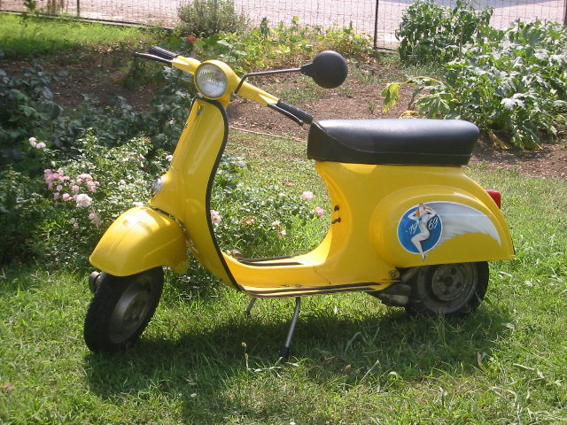 Vespa